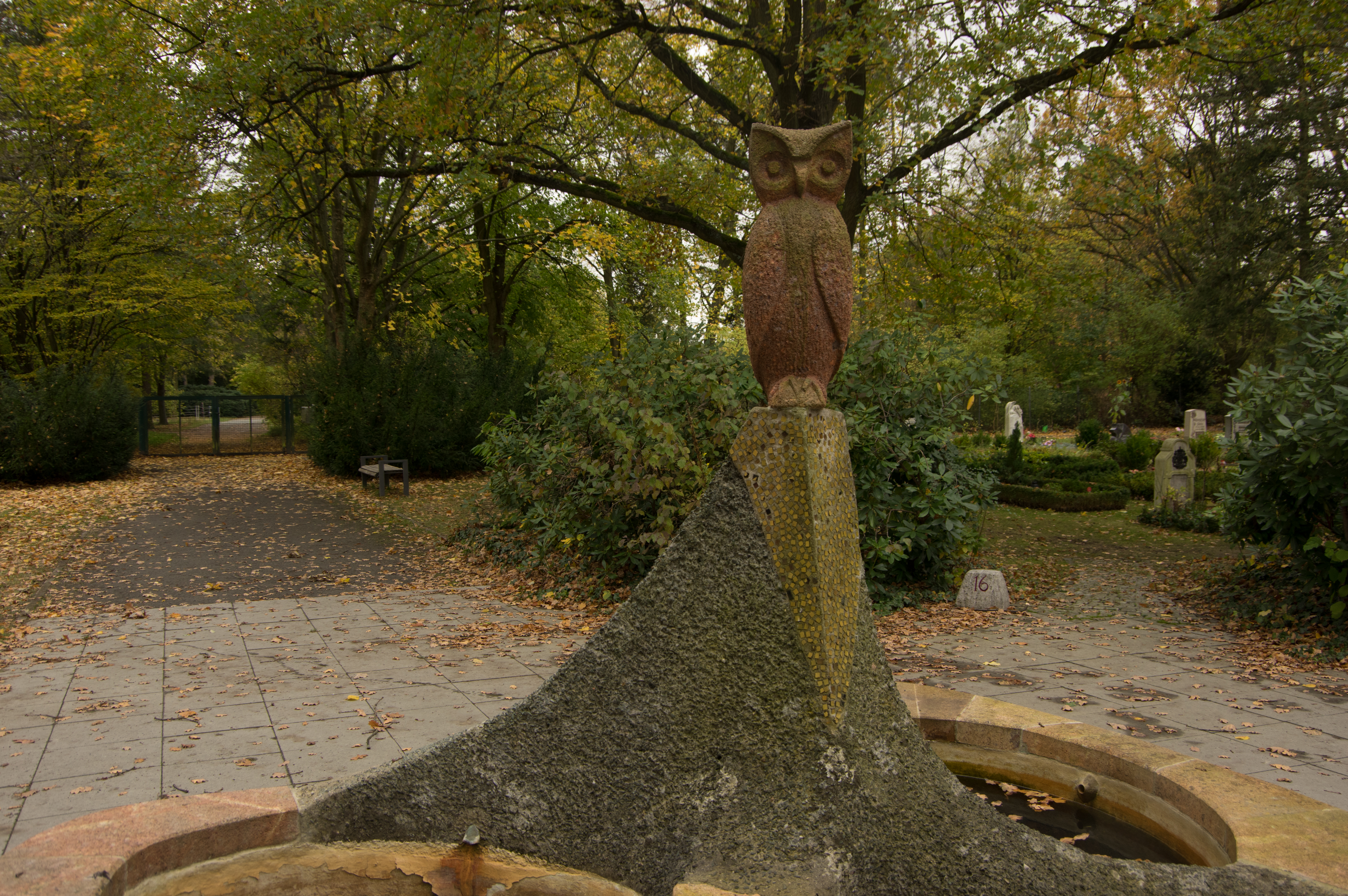 Neukölln in Berlin. Der Parkfriedhof befindet sich direkt nördlich de Britzer Garten an der Buckower Allee.